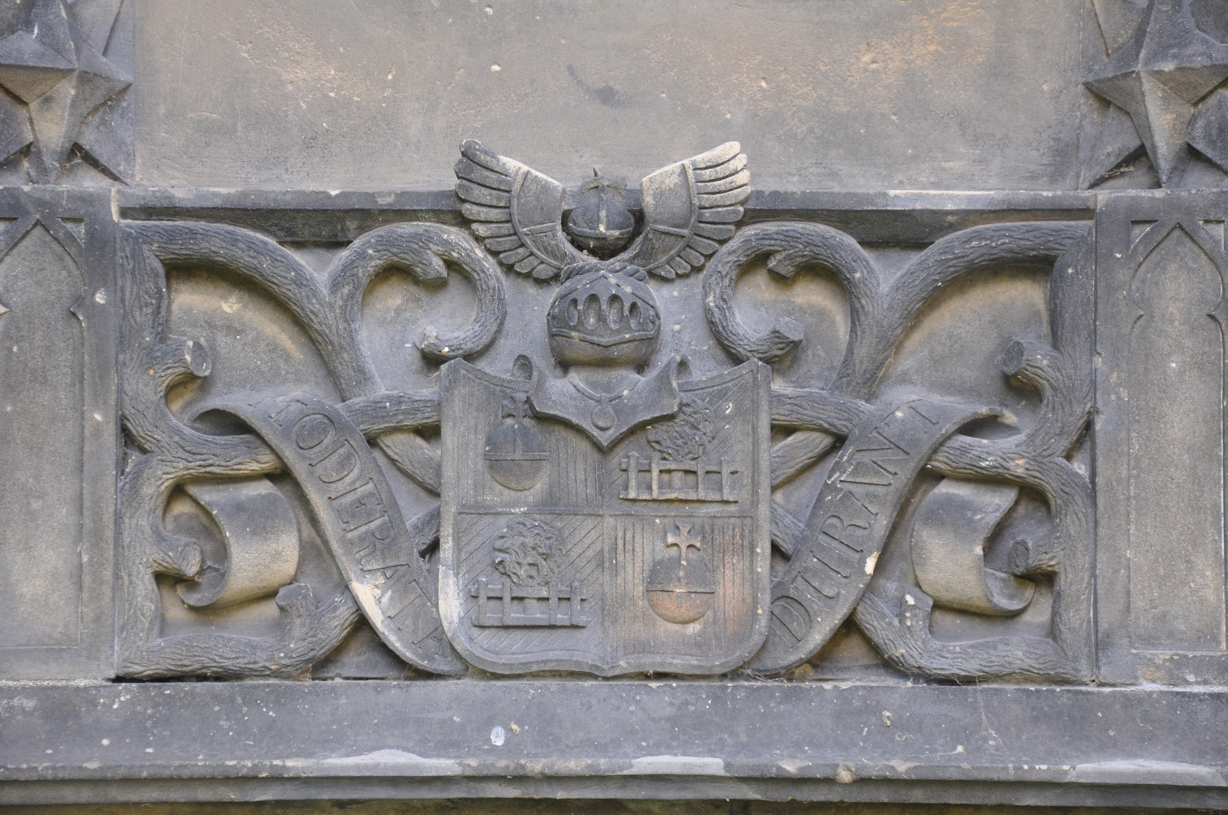 Hannover, Gartenfriedhof, Grabmal Ludwig Albert Friedrich Wilhelm Gottfried von Werlhof, Detail: Wappen